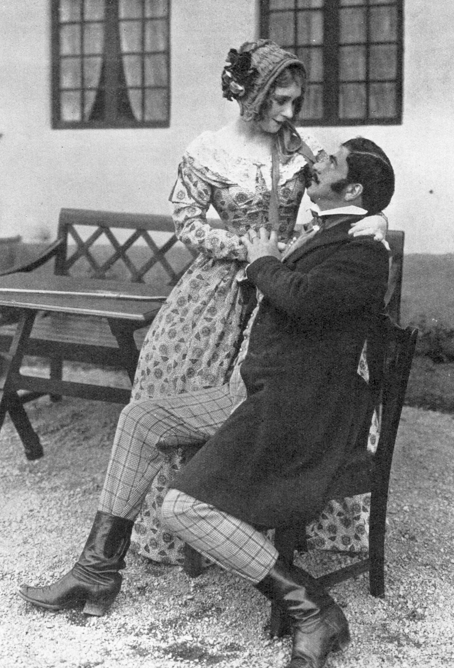 Nita Hårleman (1891-1961) mot Nils Wahlbom (1886-1937) i Livet på landet på Skansens friluftsteater. Foto i Scenen 1928.